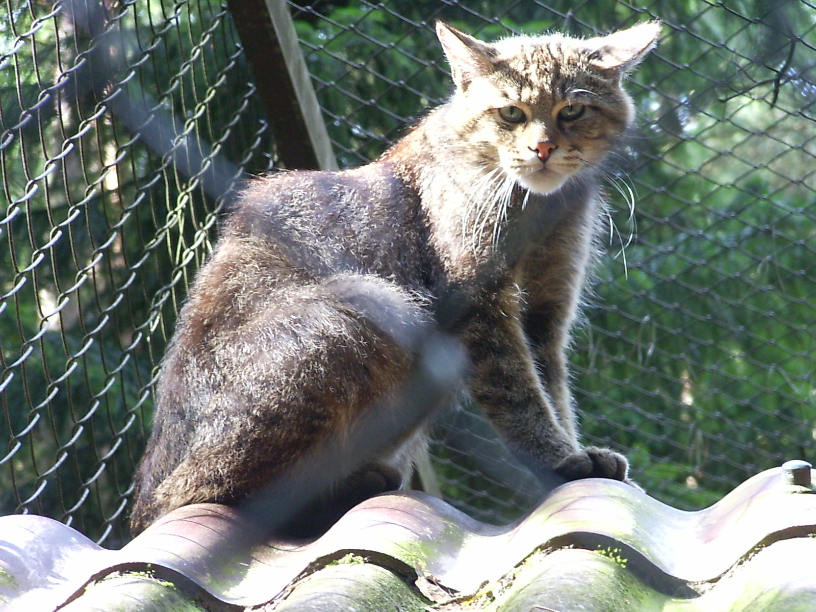 Europäische Wildkatze im Wildpark Lüneburger Heide